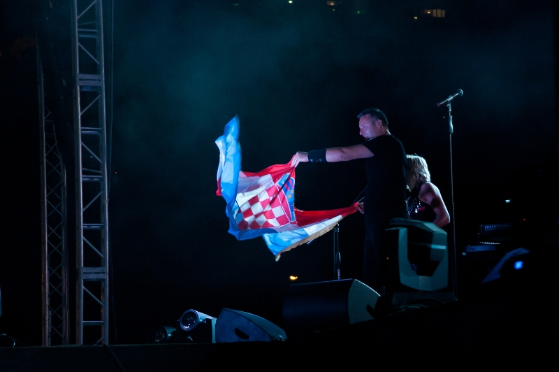 Koncert Marka Perkovića Thompsona